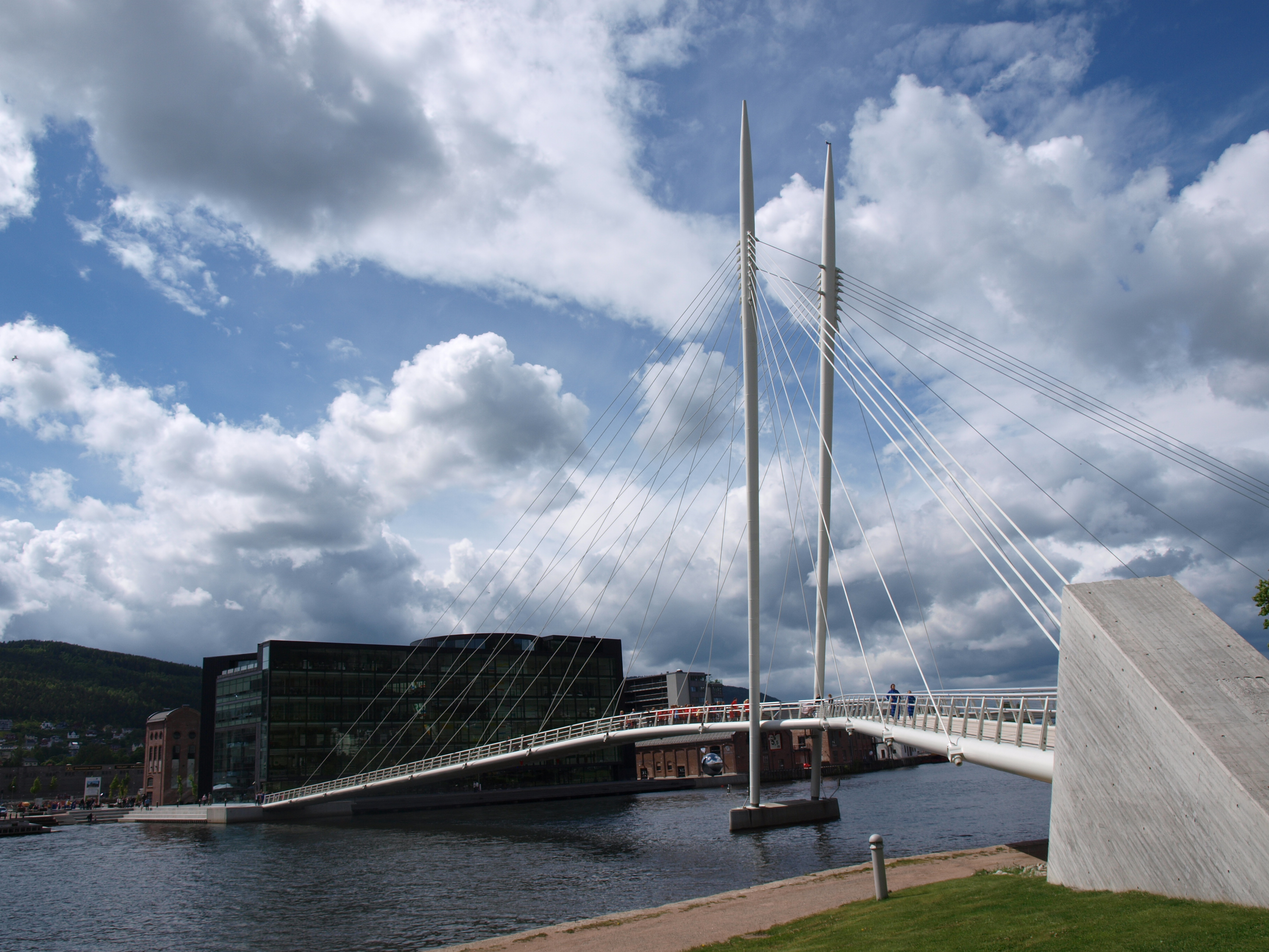 Ypsilonbrua over Drammenselva.